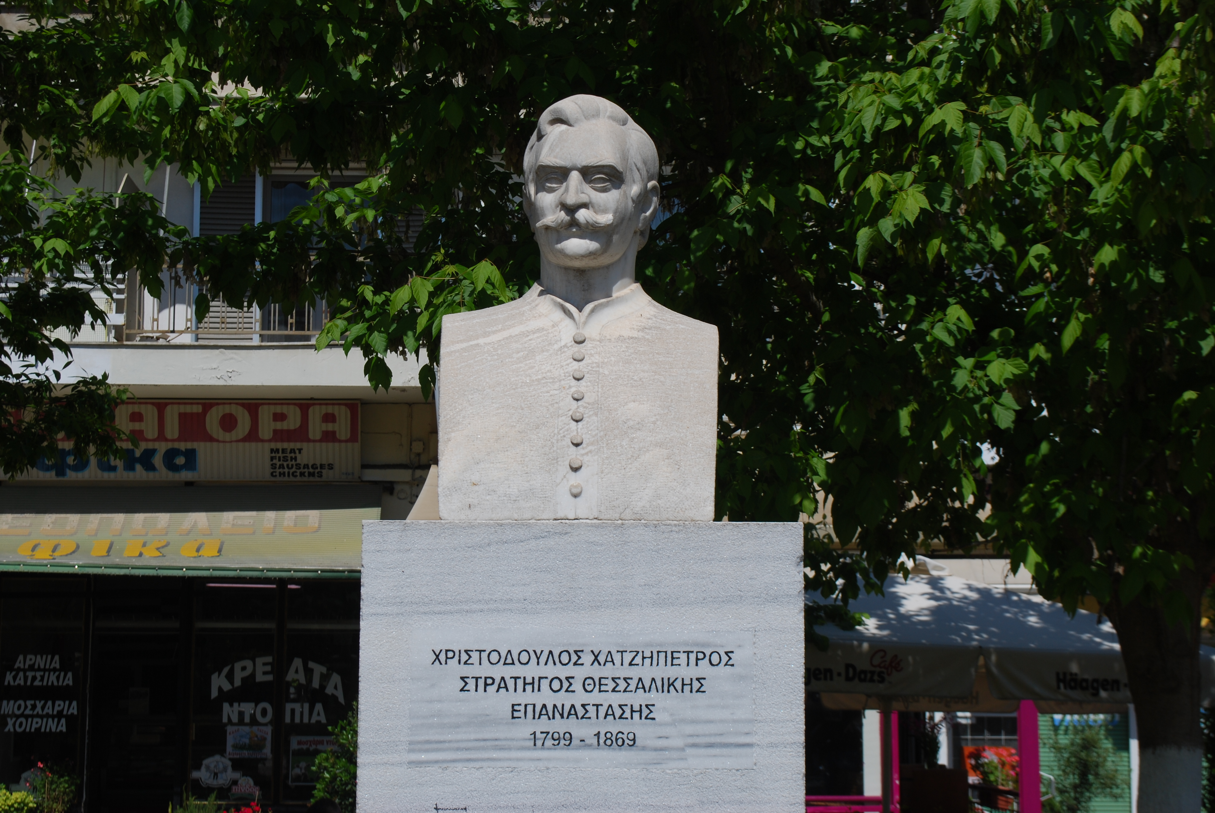 Vue de Kalambaka.